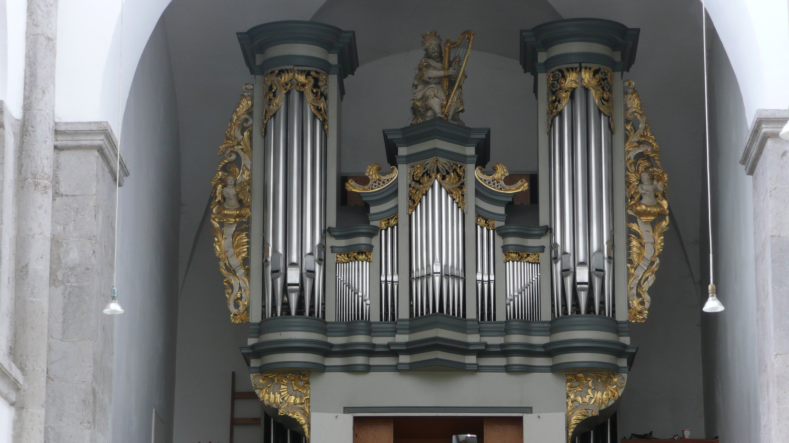 Hilden, Reformationskirche, Schurke Orgel (1970)